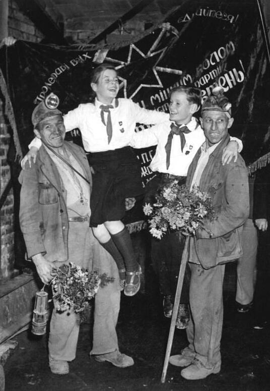 Bergarbeiter, Ehrung Zentralbild Krueger 3.11.1952 Erste Komplexbrigade in der Kupfererzgewinnung(Mansfeldkombinat "Wilhelm Pieck). Am 1.November 1952 fuhr die erste Komplexbrigade in der Kupfergewinnung, die Brigade "XIX.Parteitag" im Otto-Brosowski-Schacht des Mansfeldkombinats "Wilhelm Pieck" als Auftakt zum Monat der Deutsch-Sowjetischen Freundschaft ihre erste Schicht und erreichte eine Planerfüllung von 11, 7%.Nach Beendigung der Schicht fand eine kurze Feierstunde statt, in der Komplexbrigadier Adolf Taraba und der stellvertretende Werkleiter Stenzel den Komplexbrigadevertrag unterschrieben.Die Komplexbrigade "XIX.Parteitag", die auf Initiative des Komplexsteigers Otto Sonnabend gebildet wurde, setzt sich aus den bisherigen Brigaden des Flügels 5-II, einschließlich der Schiesser, Handwerker und Förderleute zusammen.UBz: Vor der historischen Fahne der Bergarbeiter von Kriwoj Rog, einer Ehrengabe an die Kumpel von Mansfeld, wurden der Leiter der Komplexbrigade "XIX.Parteitag", Adolf Taraba(links) und der Steiger Otto Sonnabend von Thälmann-Pionieren herzlich begrüsst.